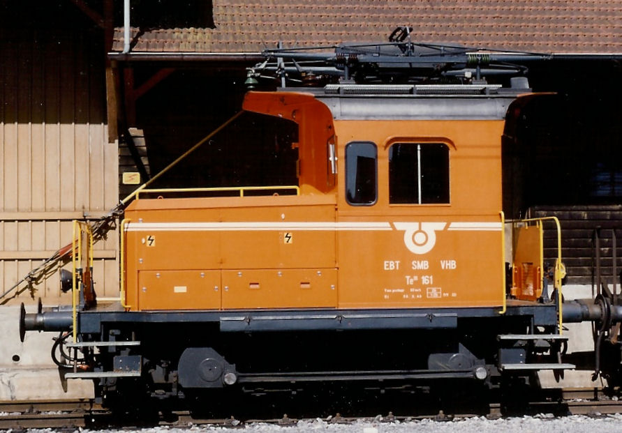 Der Te III Nr. 161 der VHB.